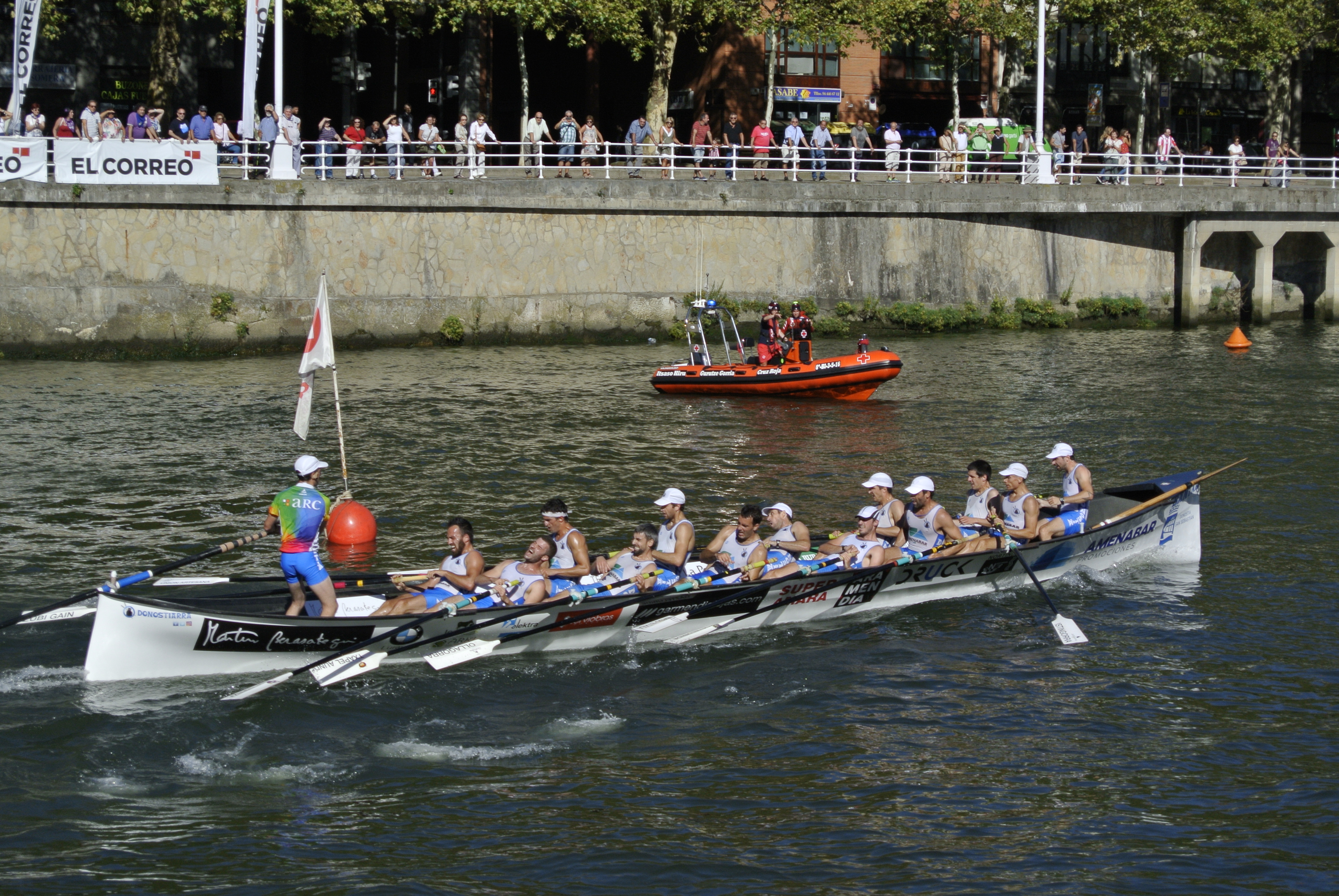 Kaiarriba Arraun Elkartea, ganador ARC-1 2017